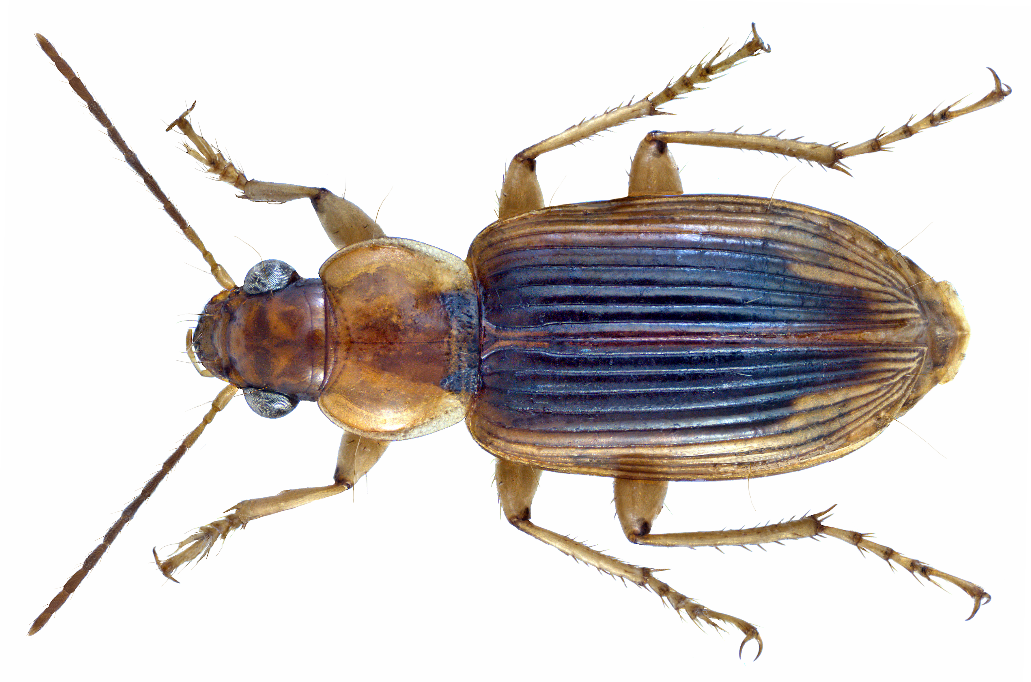 Family: Carabidae Size: 9,4 mm Location: Senegal, M`Bour, environment Club Aldiana leg. U.Schmidt, 8.-20.X.1992; det. M.Baehr, 2012 Photo: U.Schmidt, 2013